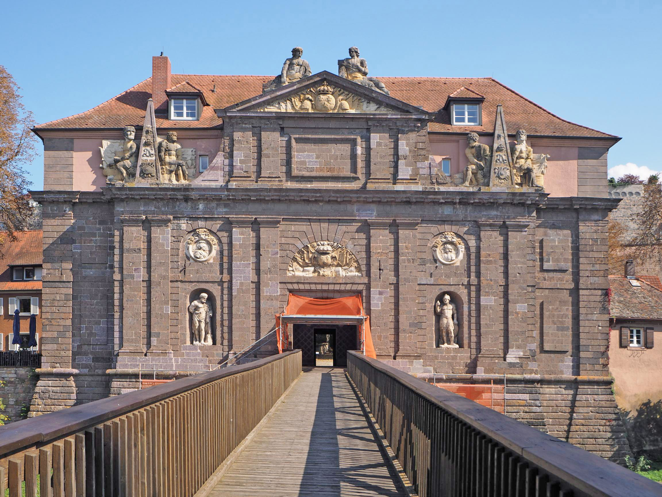 Breisach am Rhein, Rheintor, September 2017